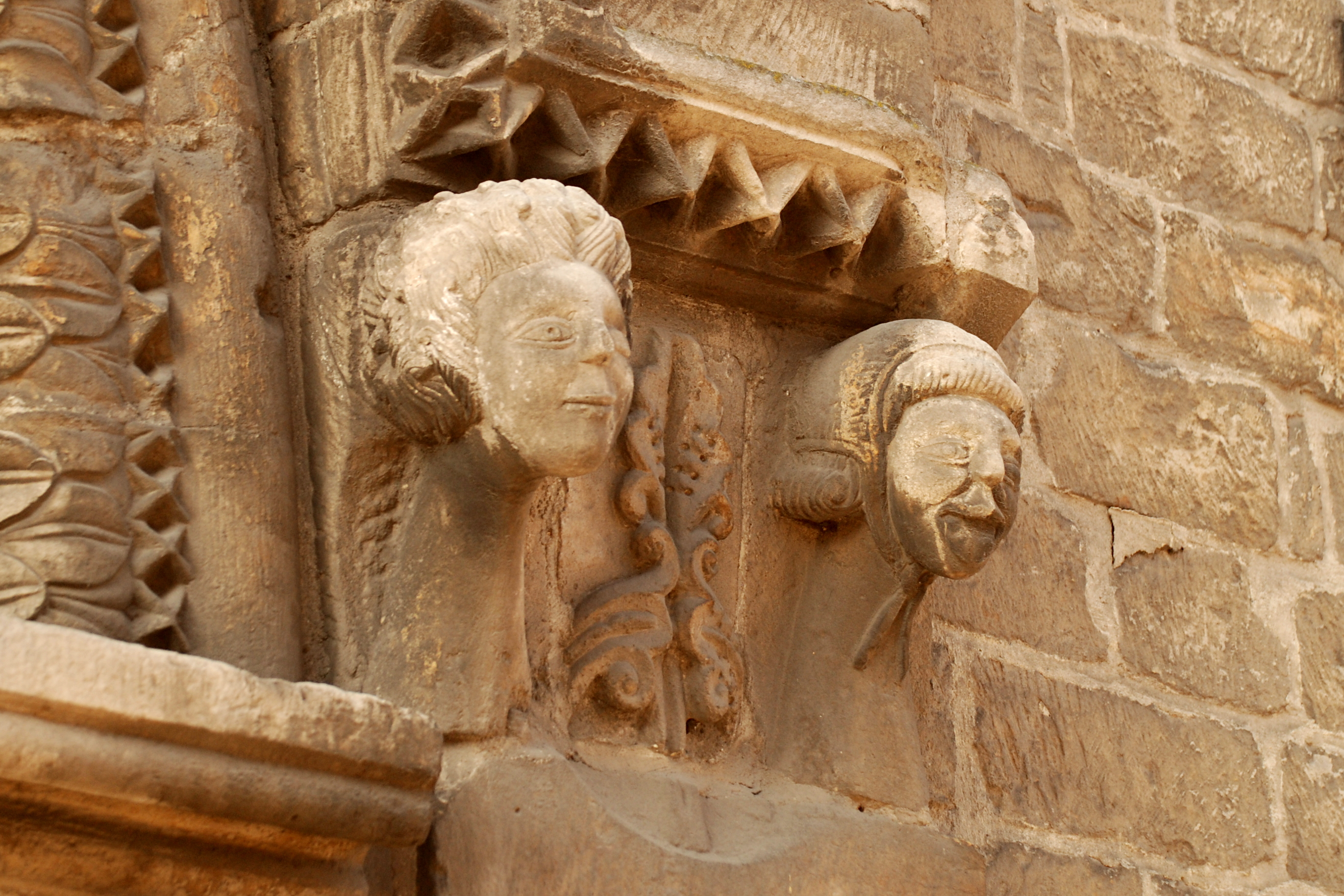 Belgique - Louvain - Chapelle de la Porte Romane